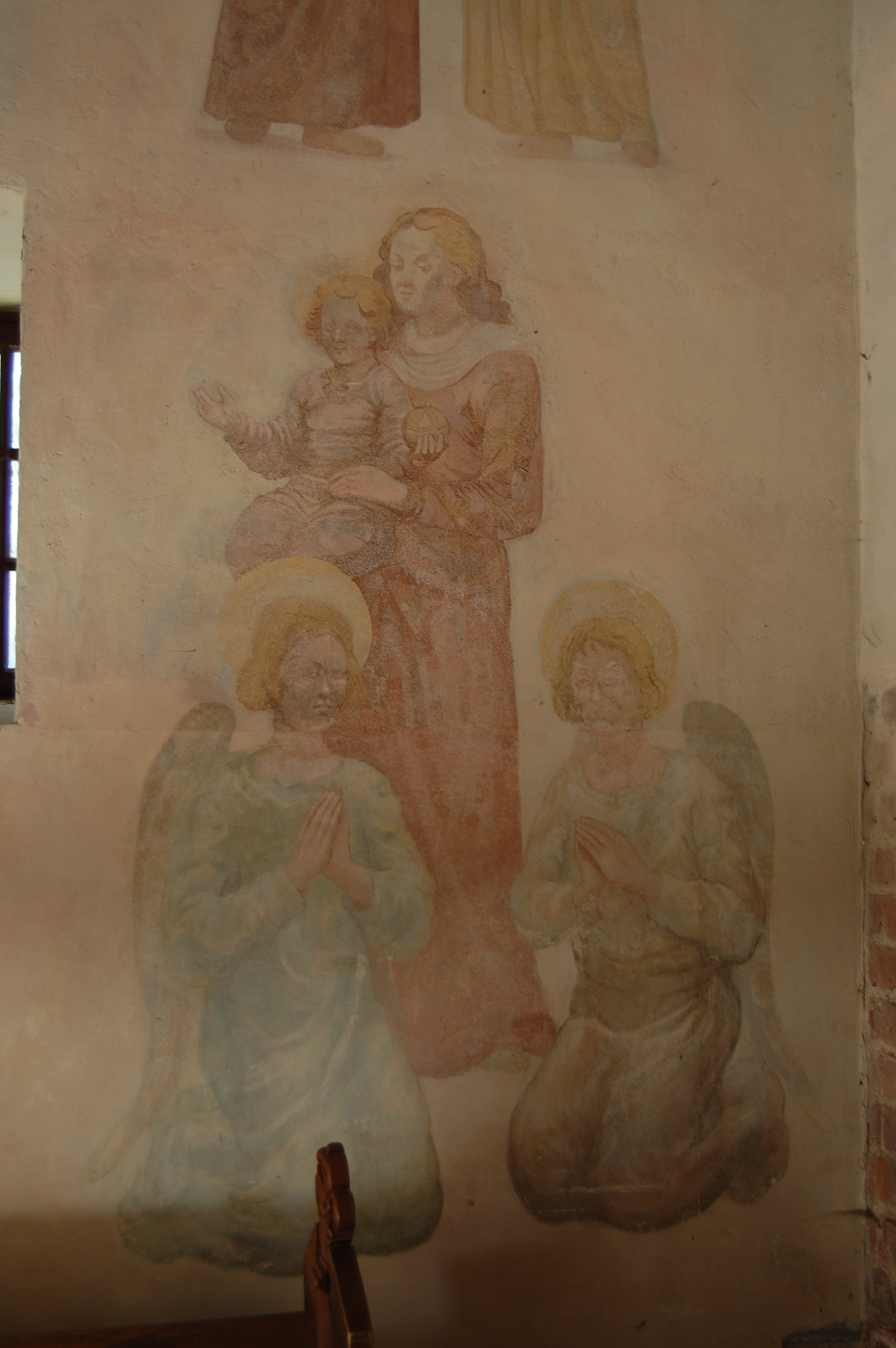 Zdobienia domku loretańskiego we wsi Gołąb w woj. lubelskim.